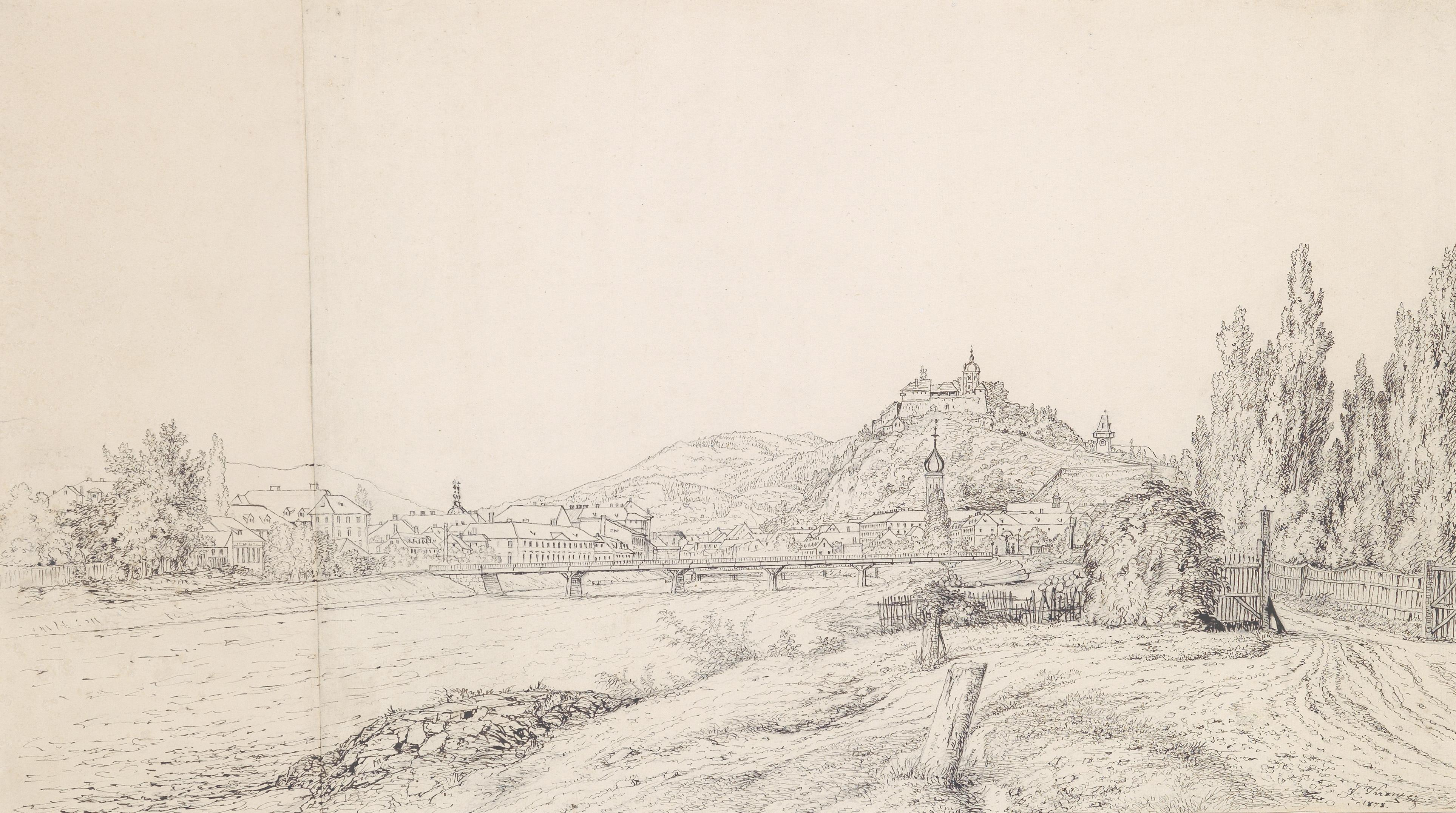 Panoramaansicht von Graz mit der Radetzkybrücke verso